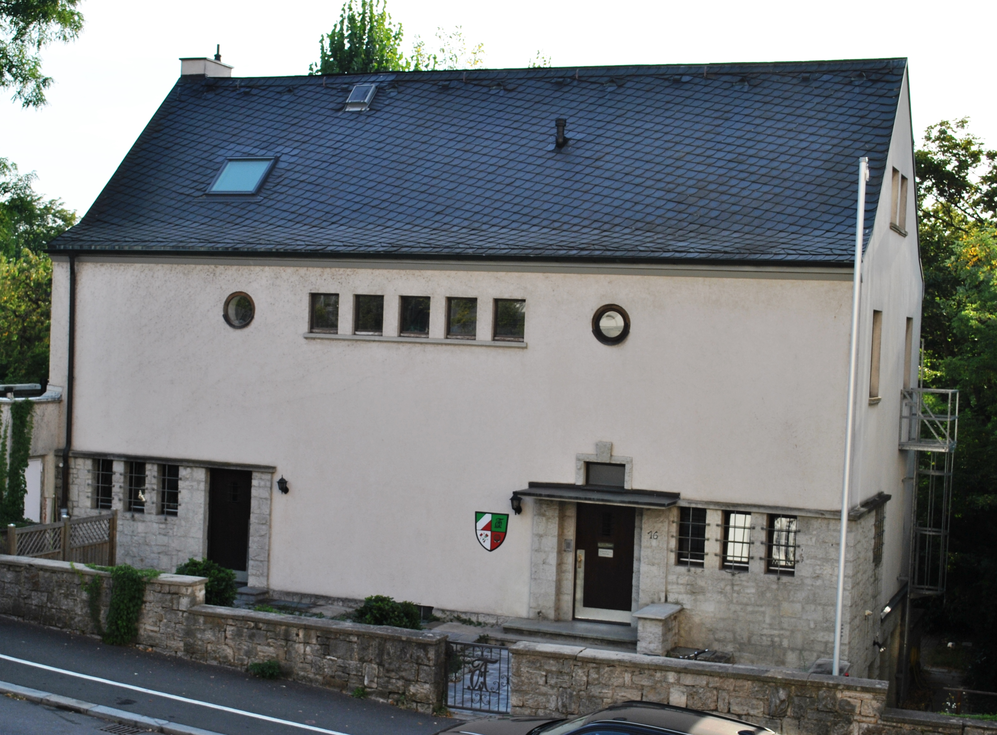 Villa Zweigeschossiger Satteldachbau, Putzfassade mit Fensterreihungen, Neue Sachlichkeit, Albert Boßlet, 1928This is a photograph of an architectural monument.